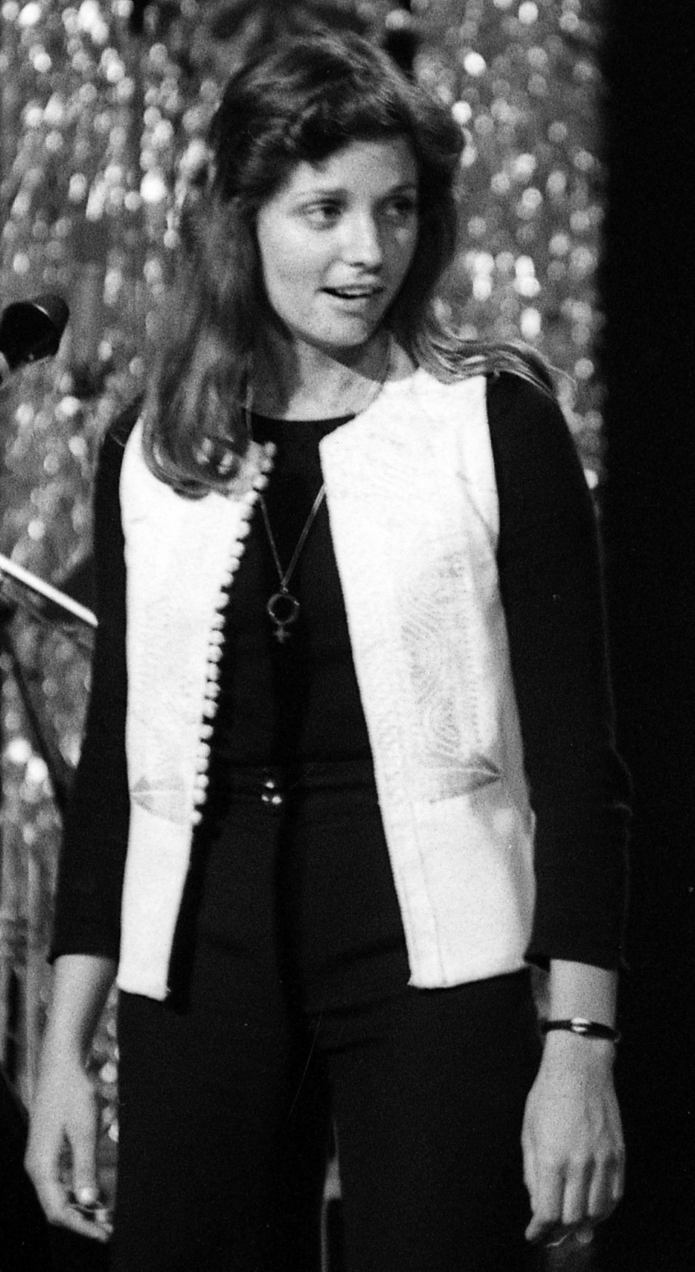 Melodi Grand Prix, norsk finale i TV-studio 1 NRK, 1974. Fra generalprøven. Foto: Petter R. Iversen. Arkivref.: PA-0797_U_7631_014_037